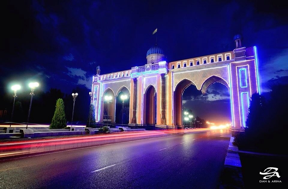 Ферганские Ворота